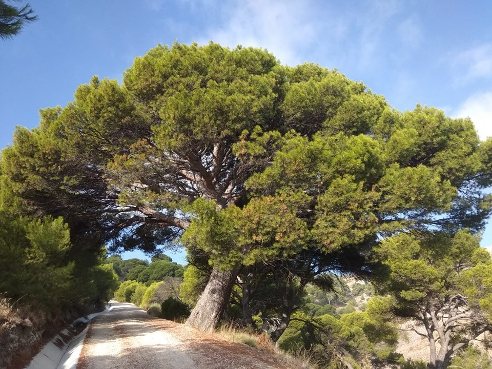 Pinar de Cánava visto desde el sendero que lo recorre.